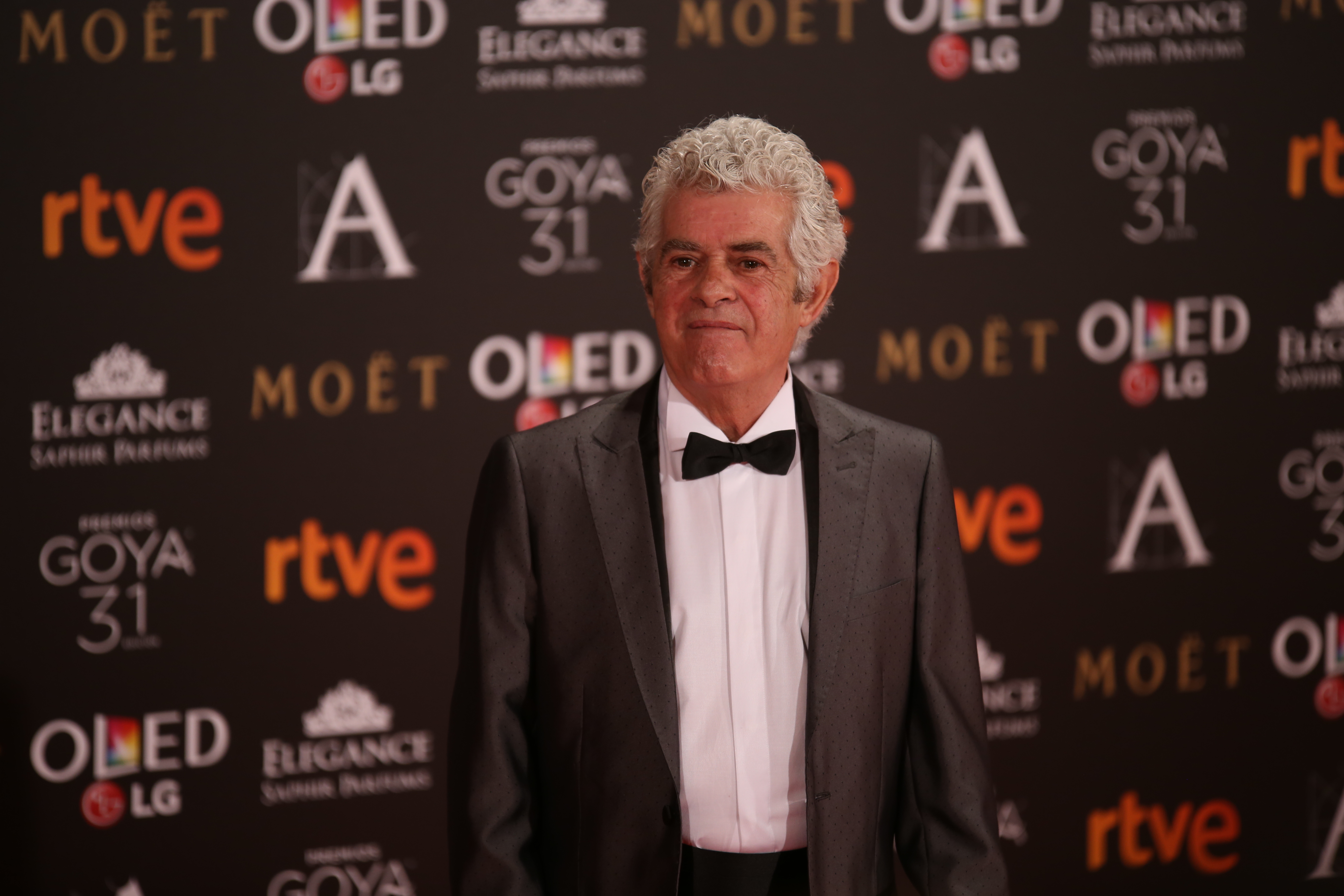 Premios Goya 2017